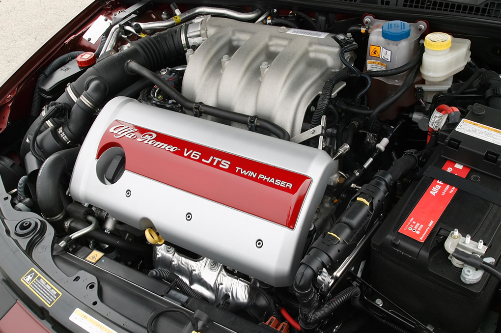 Alfa Romeo Brera 3.2l V6 JTS petrol engine